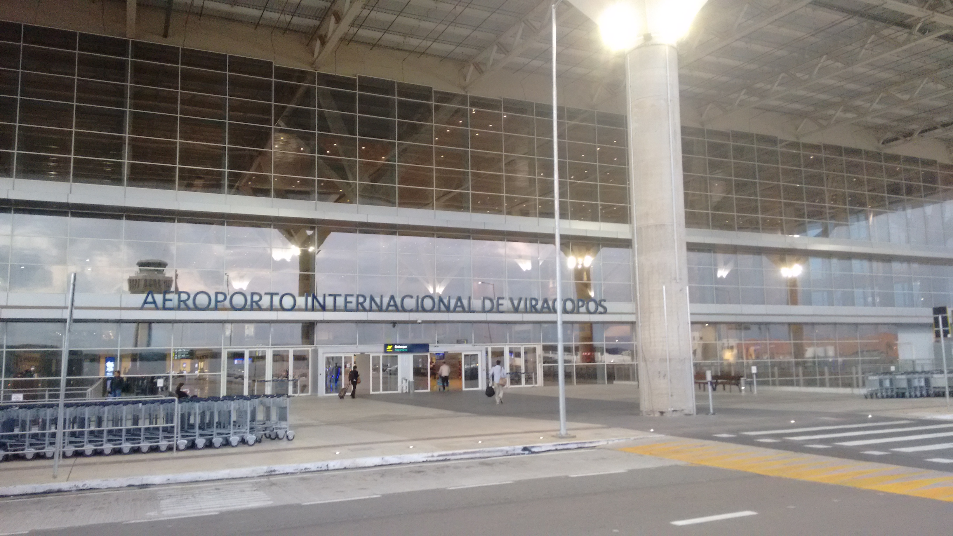 Viracopos Campinas